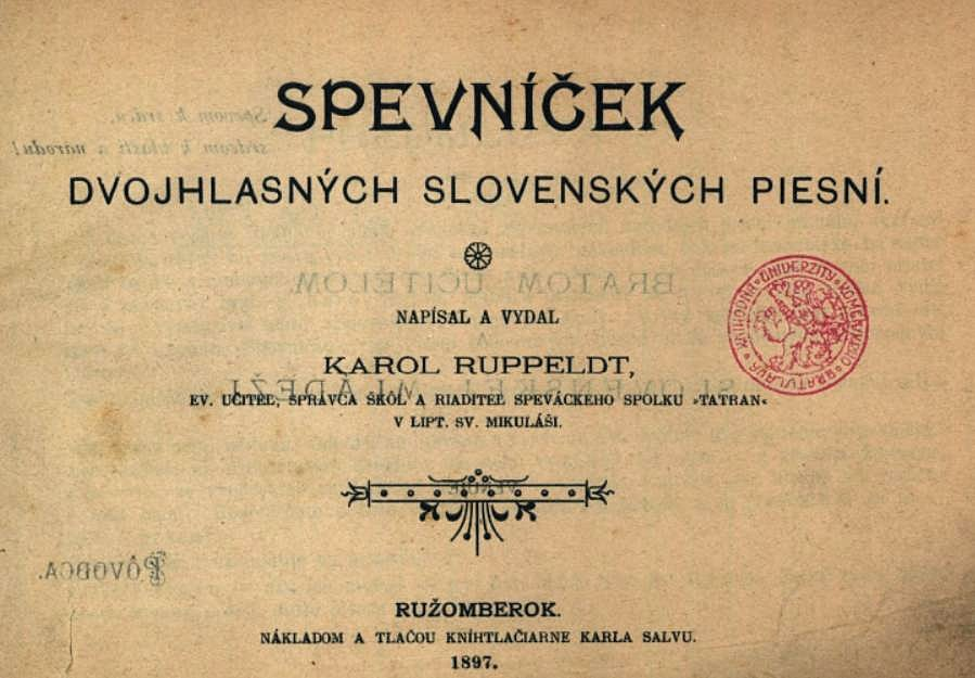 Titulný list diela Spevníček dvojhlasných slovenských piesní od Karola Ruppeldta vydaný v r. 1897.